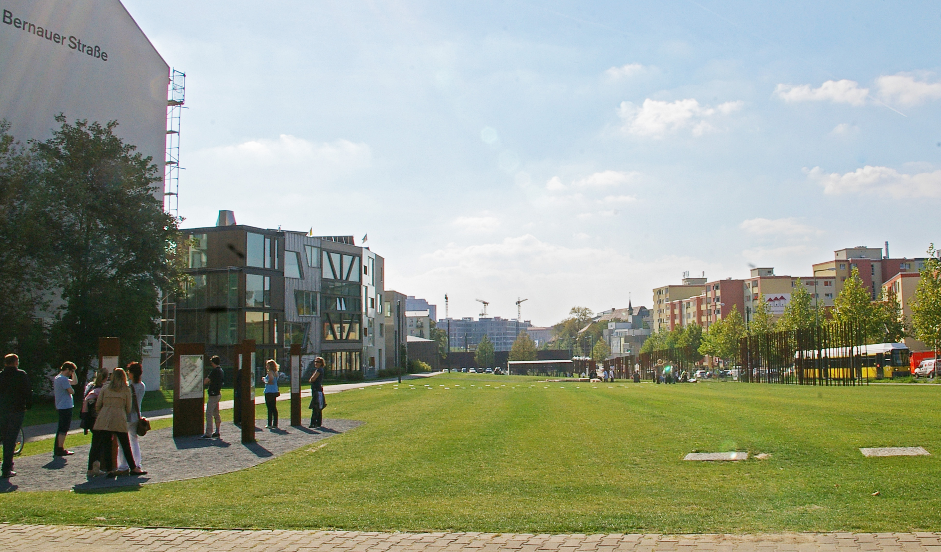 Gedenkstätte Berliner Mauer, von der Strelitzer Straße aus Richtung Westen gesehen